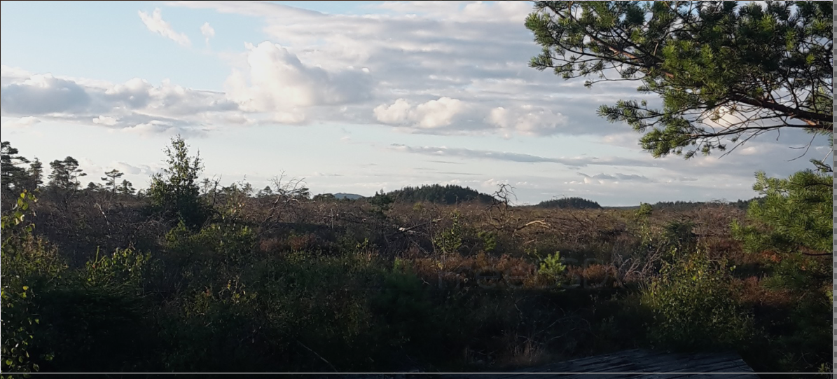 Bild tagen från övergiven turiststig på vägen från Gislaved-Henja.